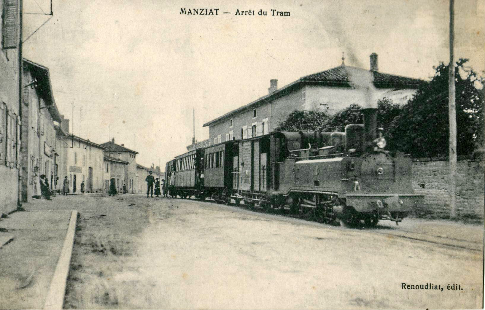 Carte postale ancienne éditée par Renoudiat : MANZIAT - Arrêt du Tram. Compagnie des chemins de fer économiques du Sud Est puis Tramways de l'Ain